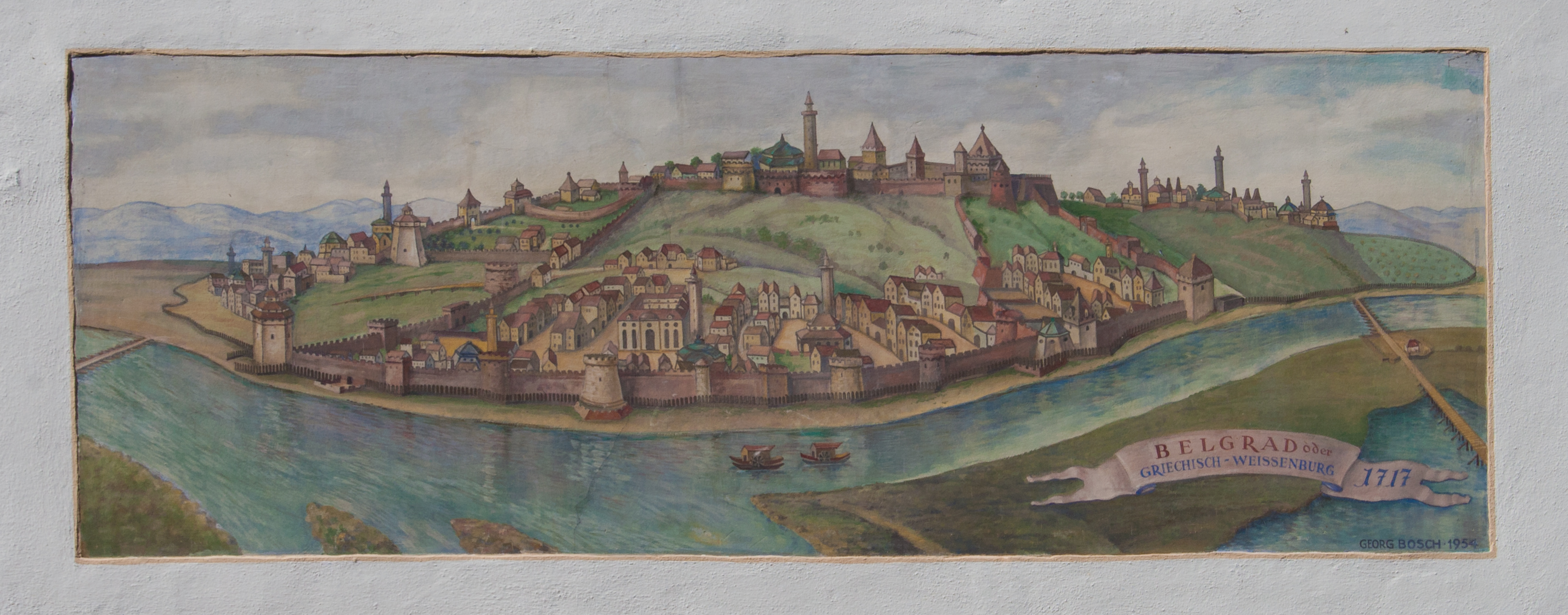 Ulm, Baden-Württemberg, Germany